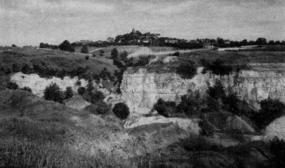 Das Kuhtal in Sankt Annaberg